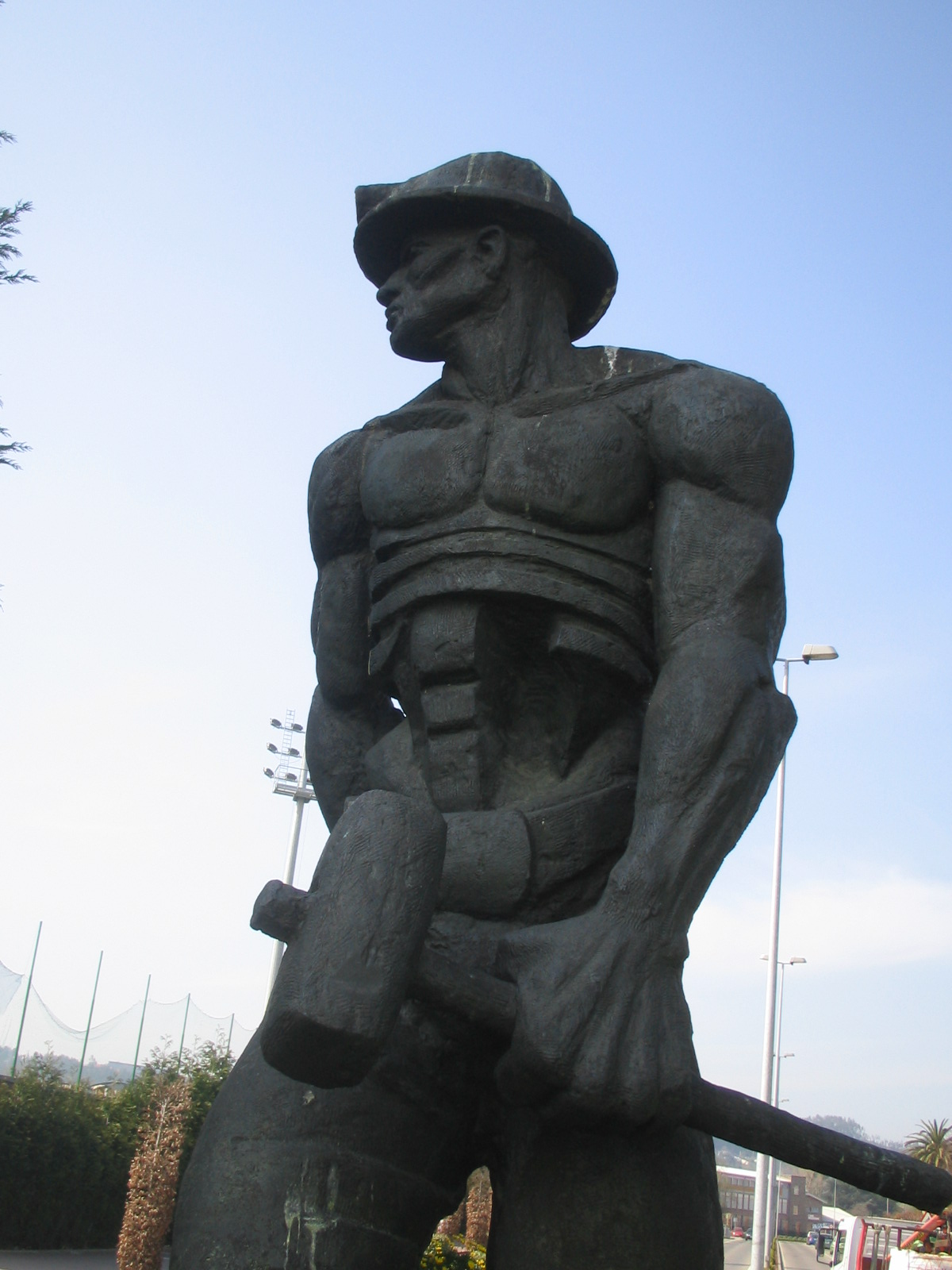 Alegoría de la minería (Allegory of mining), escultura de Jesús González de la Vega, en una rotonda del boulevard-ronda de Torrelavega.